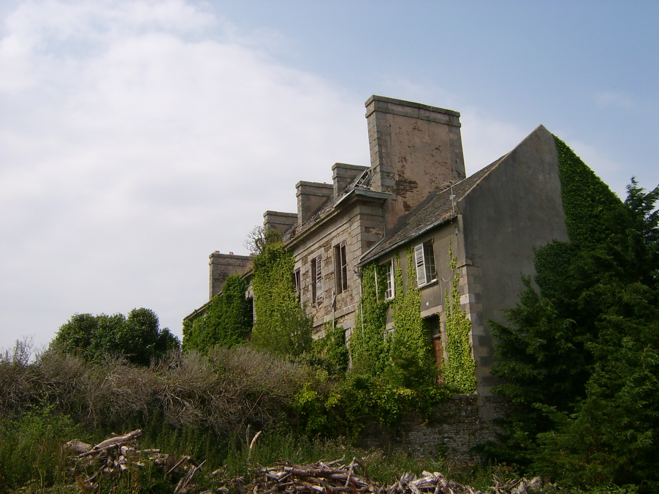 Phot oerso ar Pilhaouer